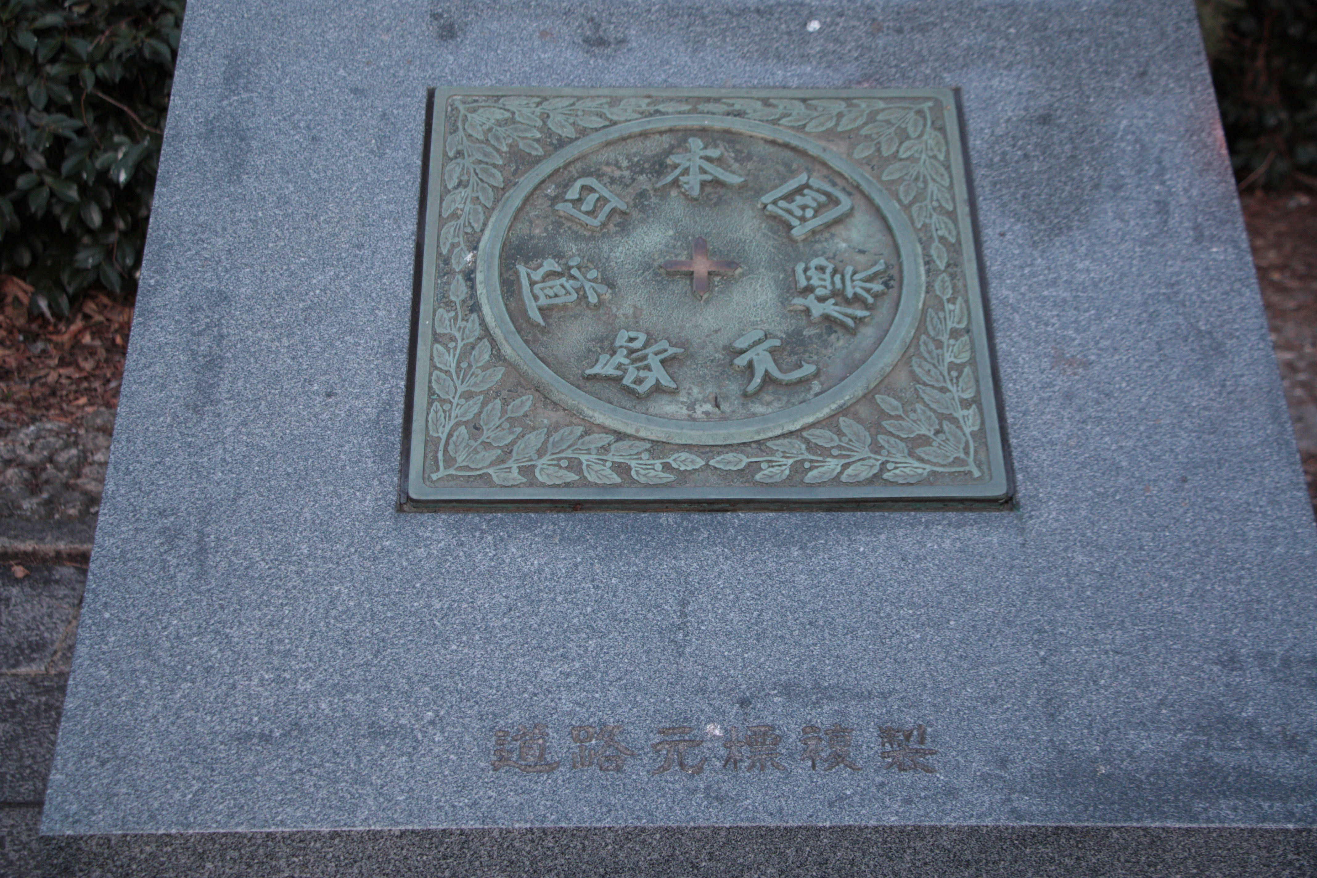 日本道路元標